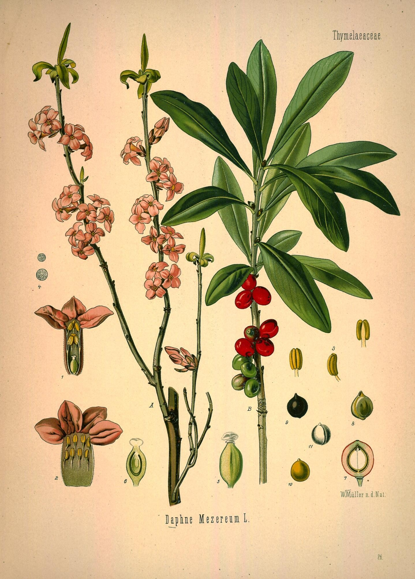 Seidelbast. A blühende, B fruchtende Pflanze in natürl. Grösse; 1 Blüthe im Längsschnitt, vergrössert; 2 Krone, ausgebreitet, desgl.; 3 Staubgefäss, desgl.; 4 Pollenkörner, desgl.; 5 Stempel, desgl.; 6 derselbe im Längsschnitt, desgl.; 7 Beere im Längsschnitt, desgl.; 8, 9, 10, 11 Same mit und ohne Häute, desgl.